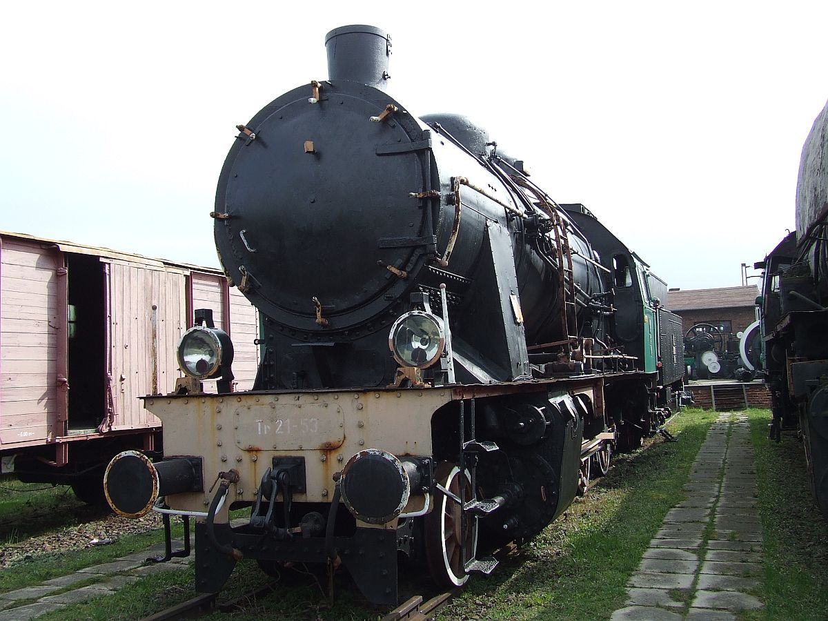 Tr21, Izba historii i skansen taboru kolejowego